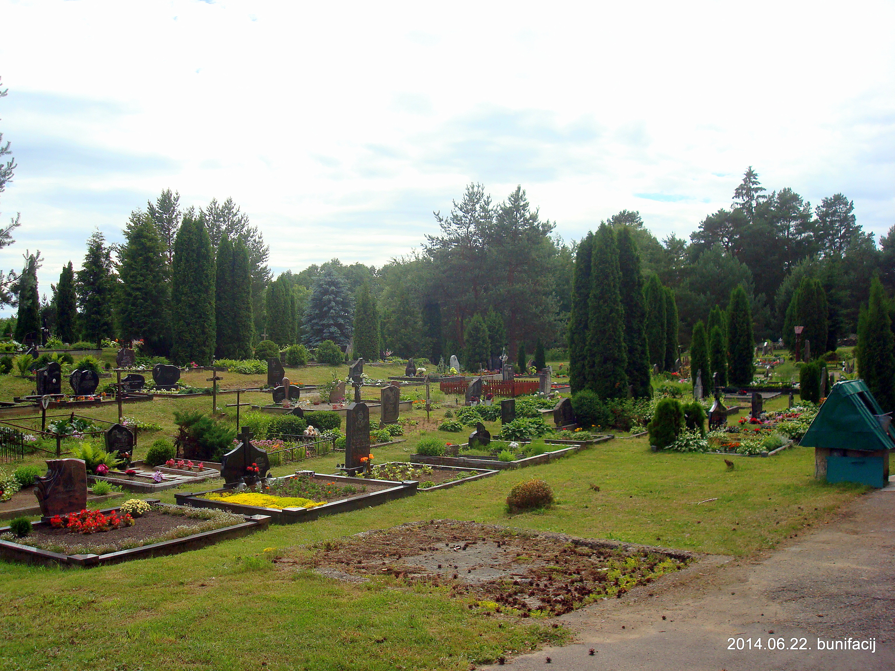 На кладбище 2